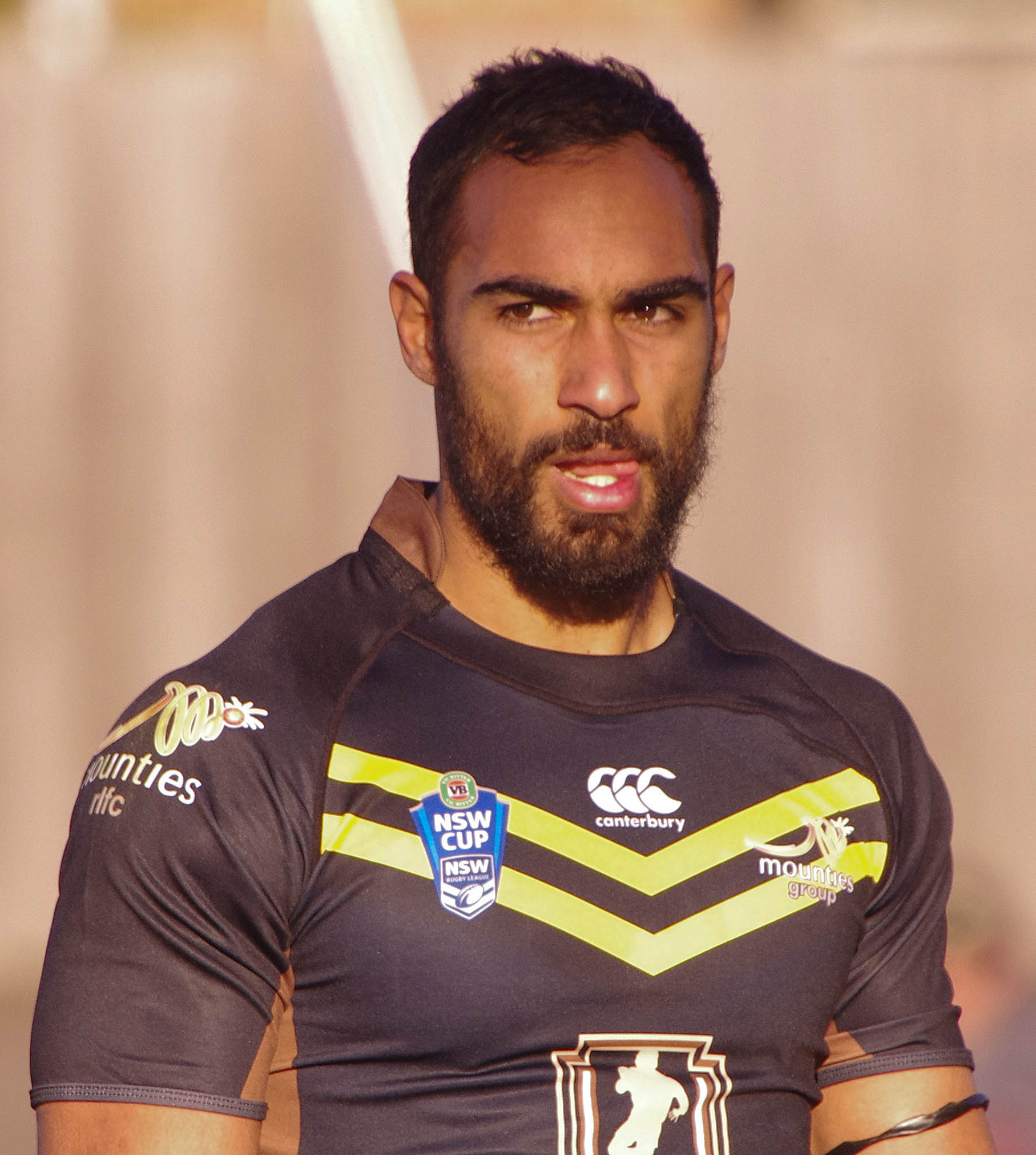 REECE ROBINSON